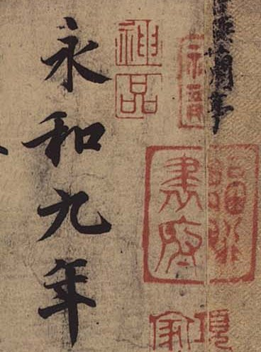 Yonghe jiunian, der Anfang der chinesischen Kalligrafie Orchideenpavillon des chinesischen Kalligrafen Wang Xizhi (für die GNU FDL)